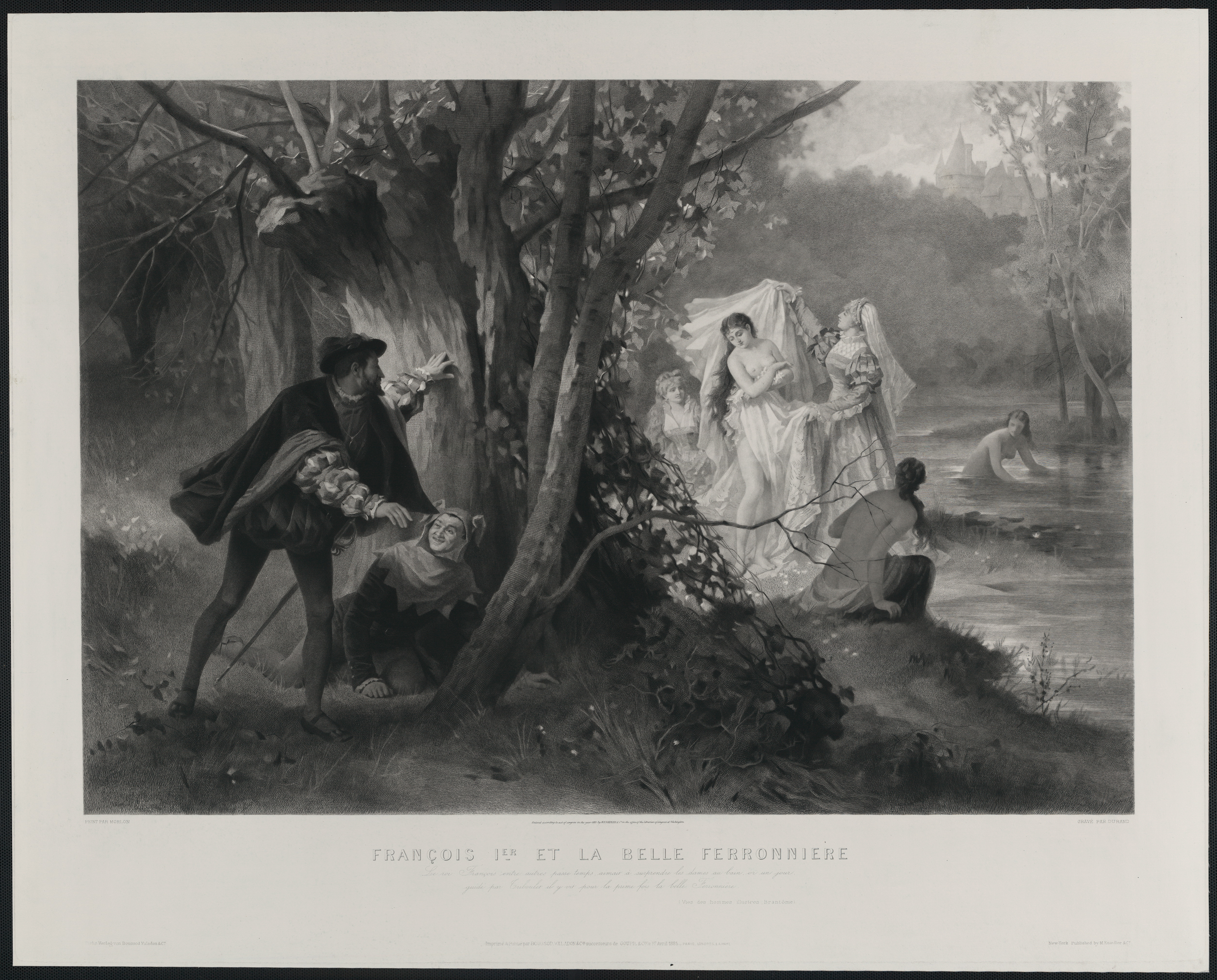 François 1er et la belle ferronniere / peint par Morlon ; gravé par Durand